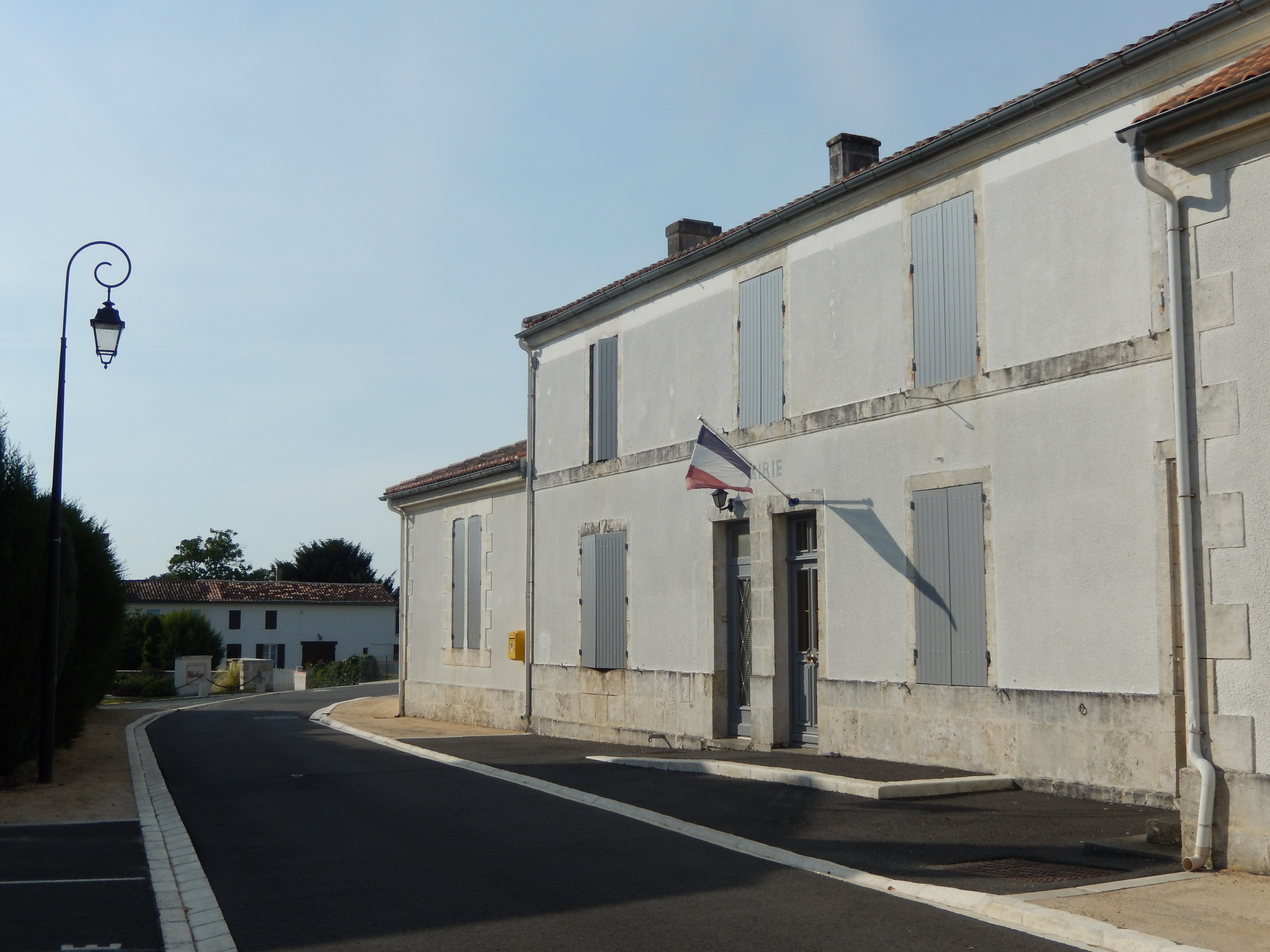 Mairie de Soulignonne, Charente-Maritime, France.